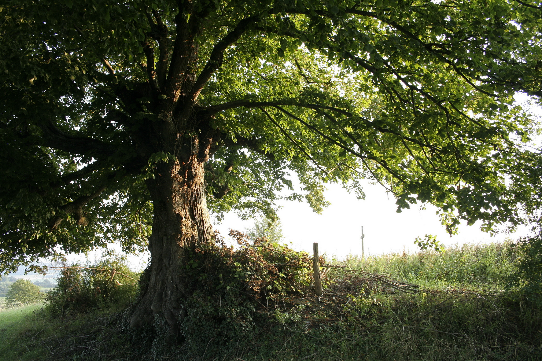 Wavreille, le vieux tilleul à grandes feuilles Tilia platyphyllos dit "Tyou dol tchapèle" s'élevant ou s'étendait autrefois le village de Biètrenne décimé par la peste au XVIIe siècle.